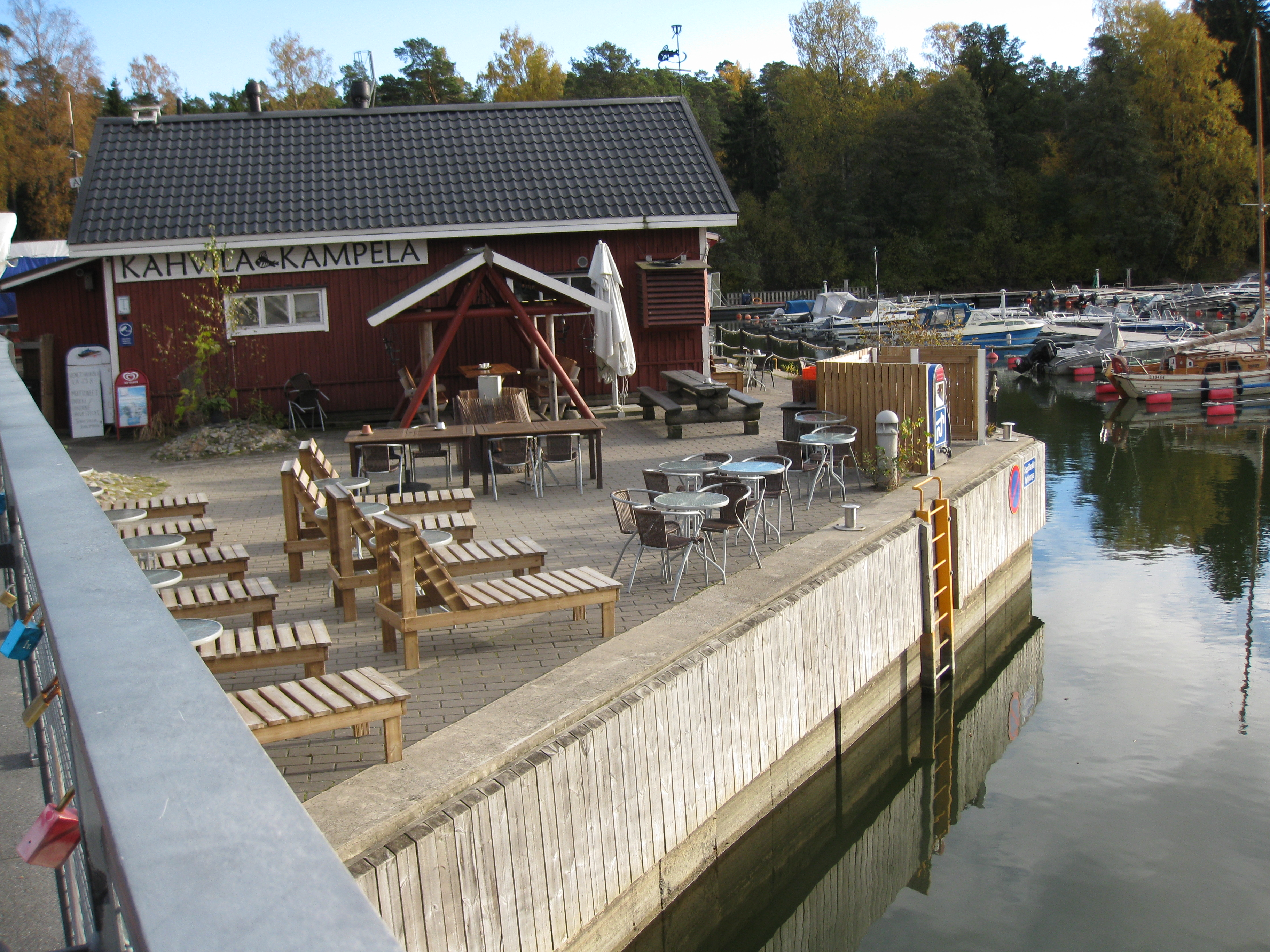 Kahvila Kampelan terassia.